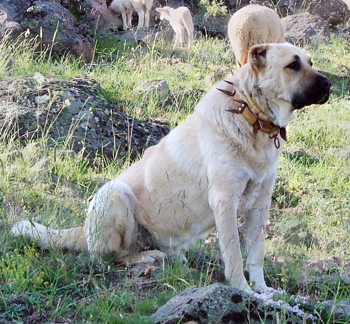 Diken tasmalı bir kangal çoban köpeği, Türkiye